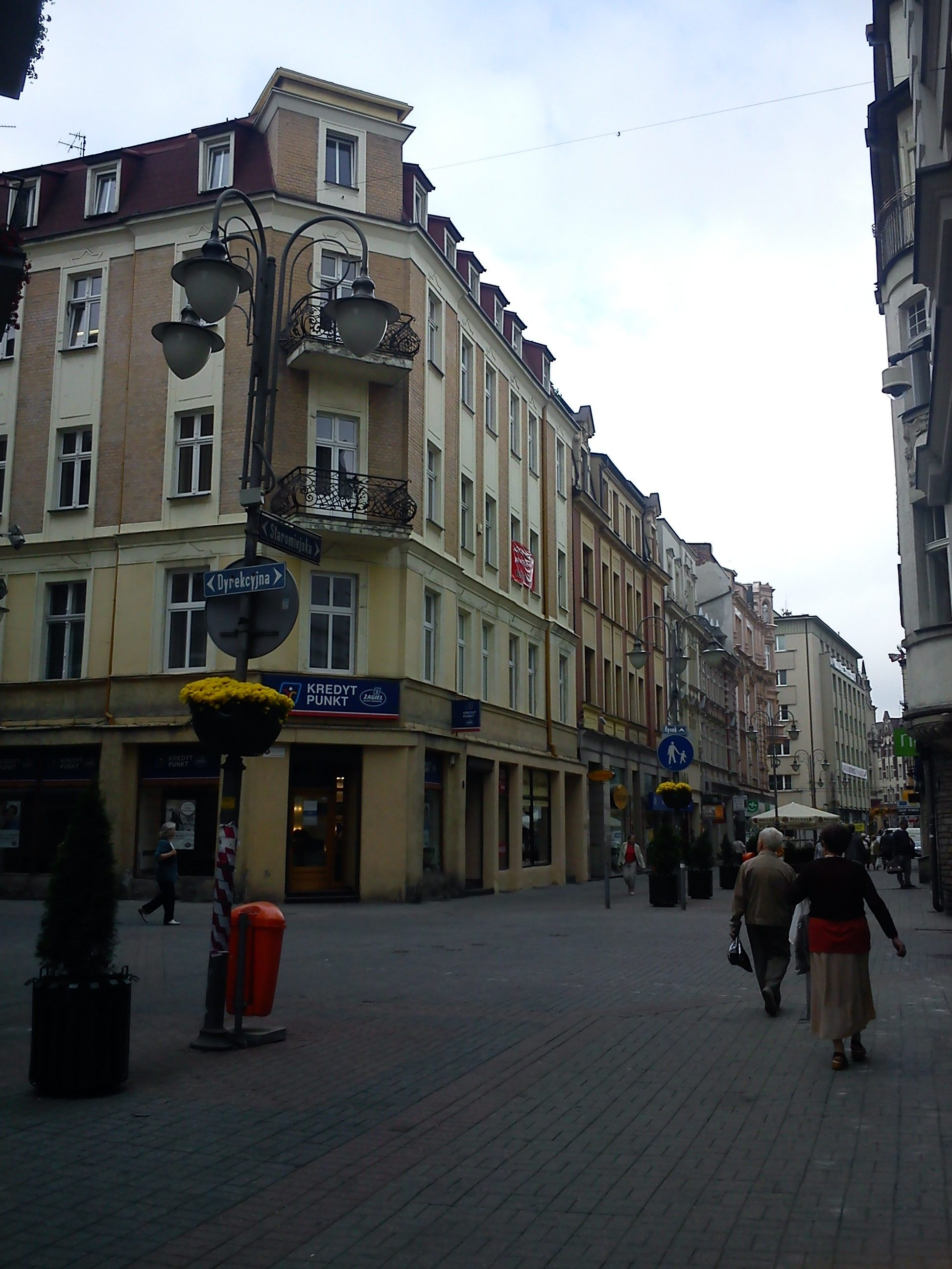 Katowice-Ulica Staromiejska.